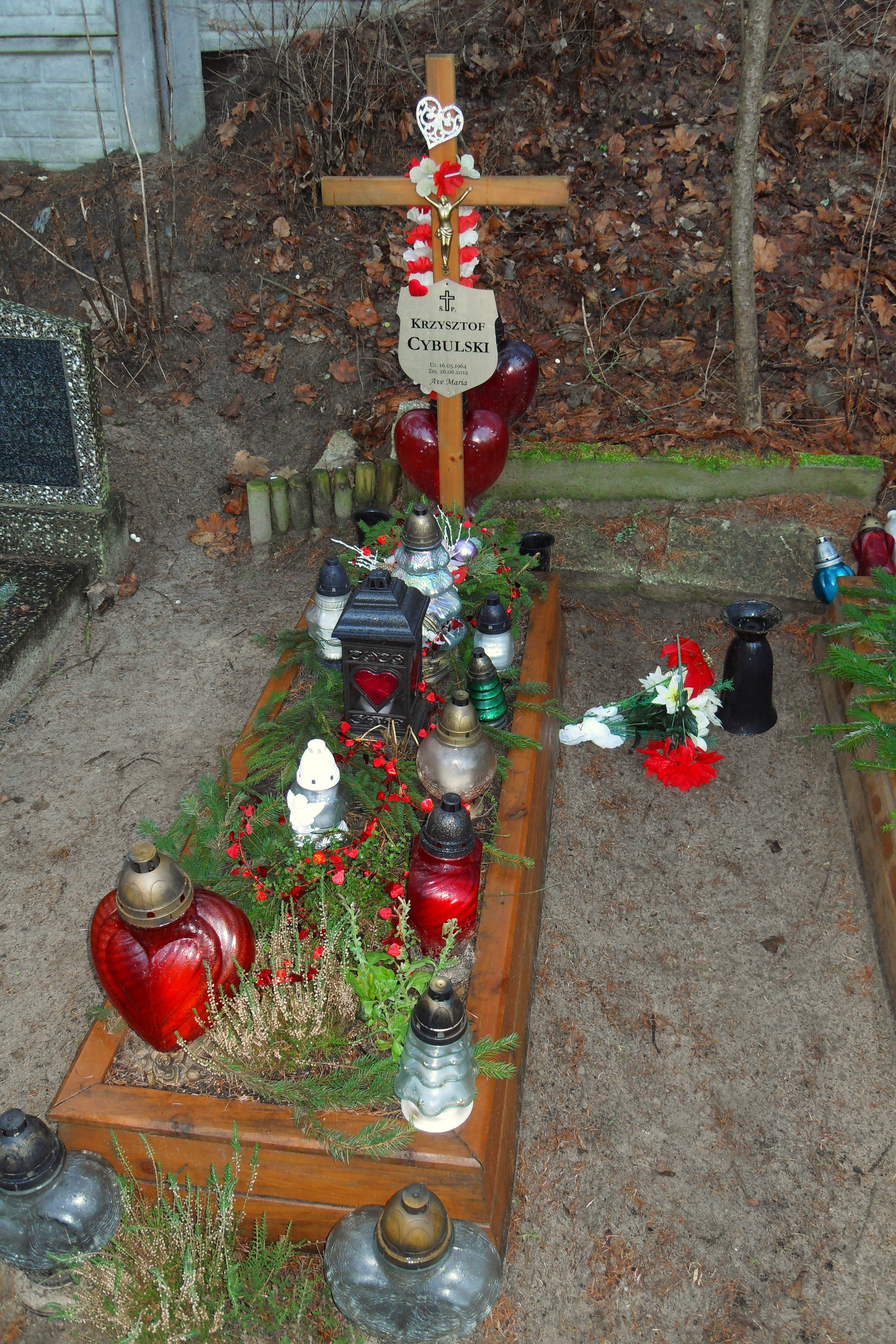 Gdańsk Wrzeszcz. Cmentarz Srebrzysko, grób Krzysztofa Cybulskiego.